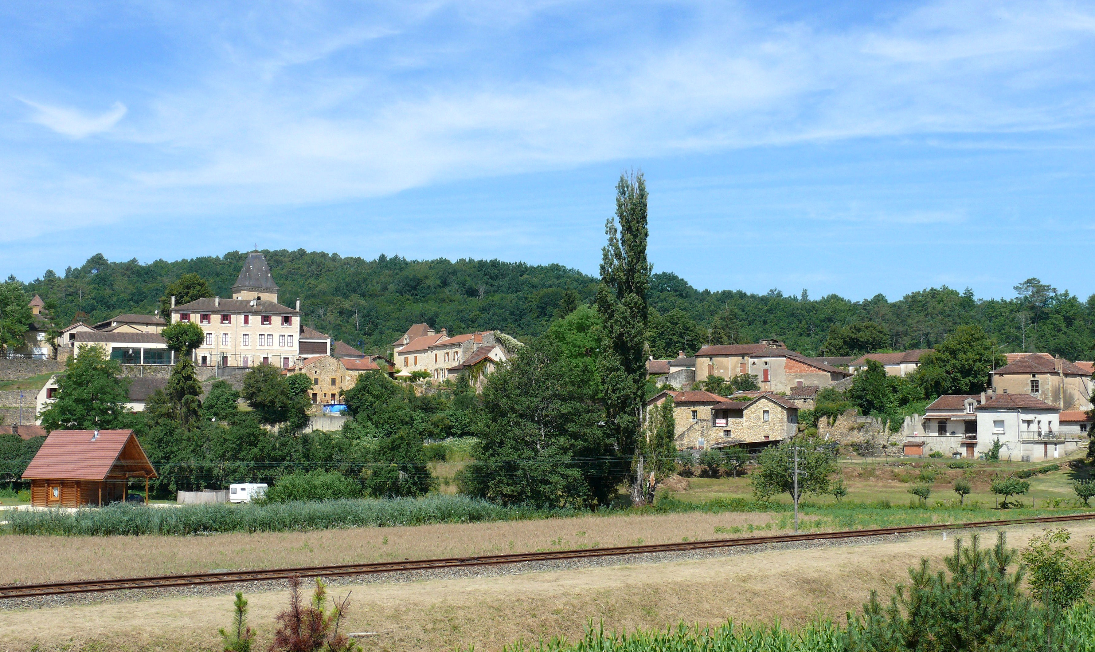 Saint-Cernin-de-l'Herm - Le village